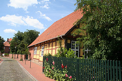 Freihof in Stolzenau, Burgmannssitz der Herren von Münchhausen seit 600 Jahren